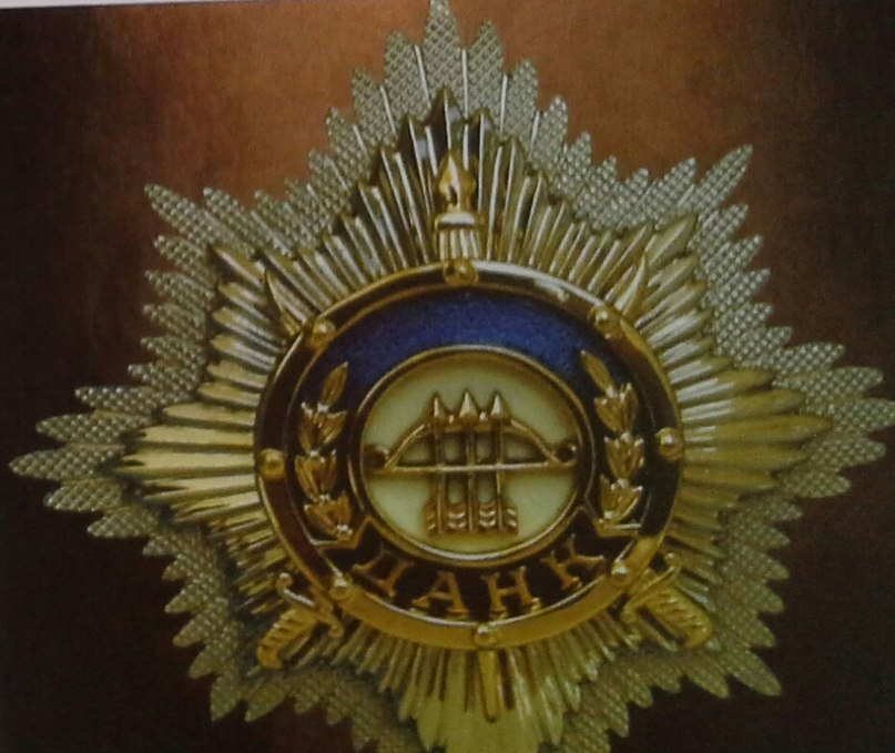 Қазақша (кирил): "Даңқ" ордені